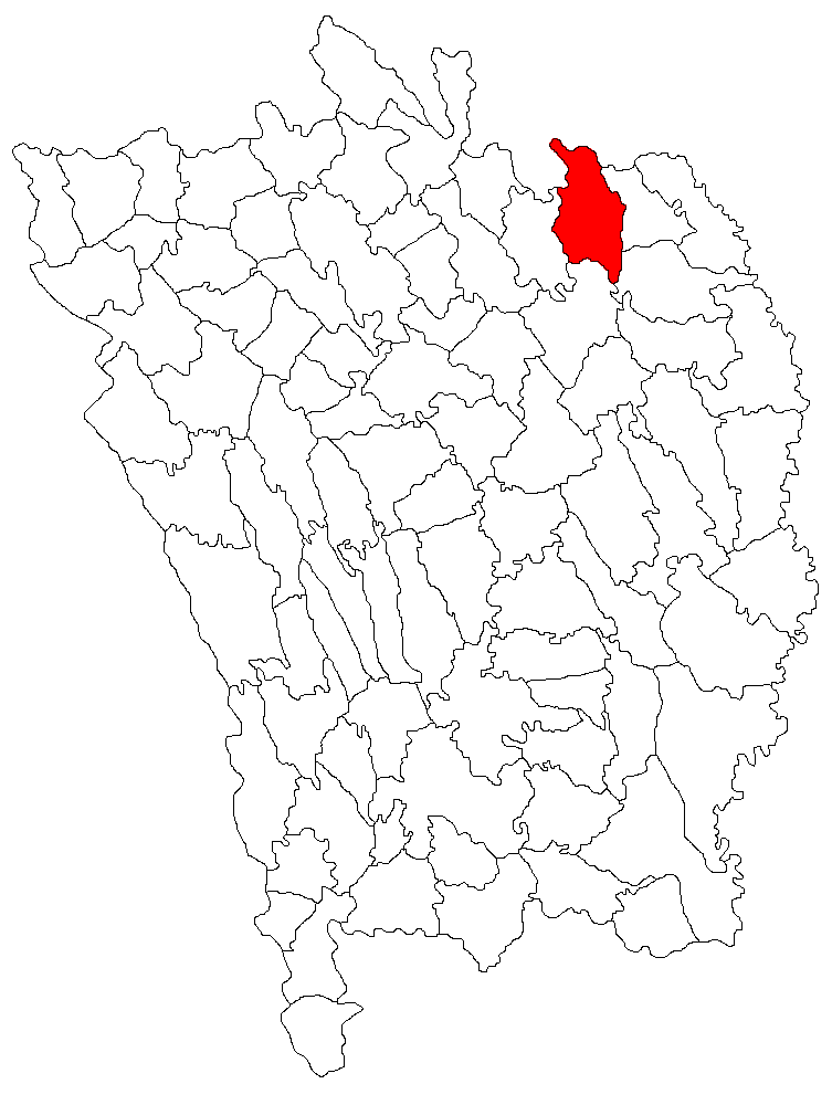 Categorie:Hărţi ale judeţului Vaslui